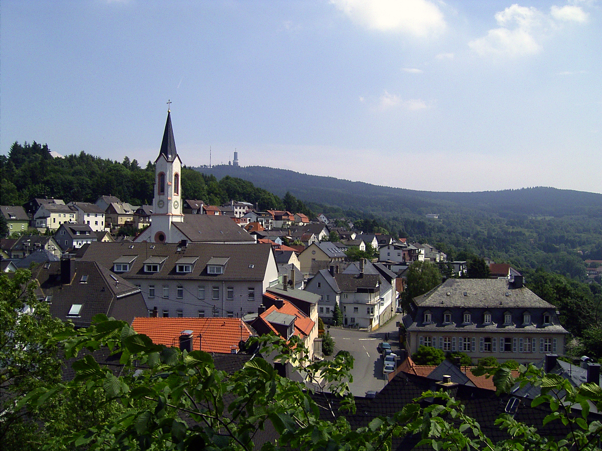 Oberreifenberg im Taunus - von der Burg aus. Im Hintergrund der Große Feldberg